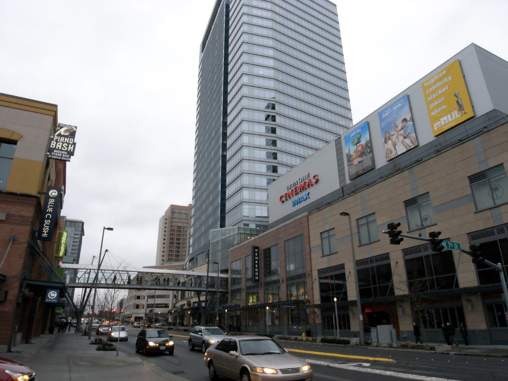 Bellevue Square and Lincoln Square